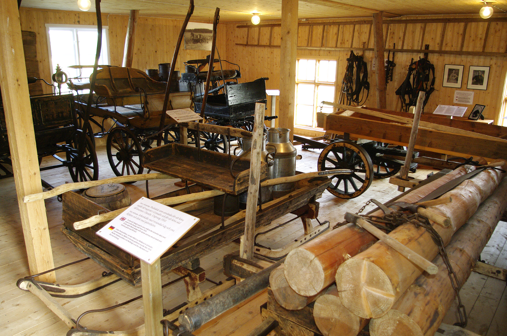 Smörhöga museum in Sweden.